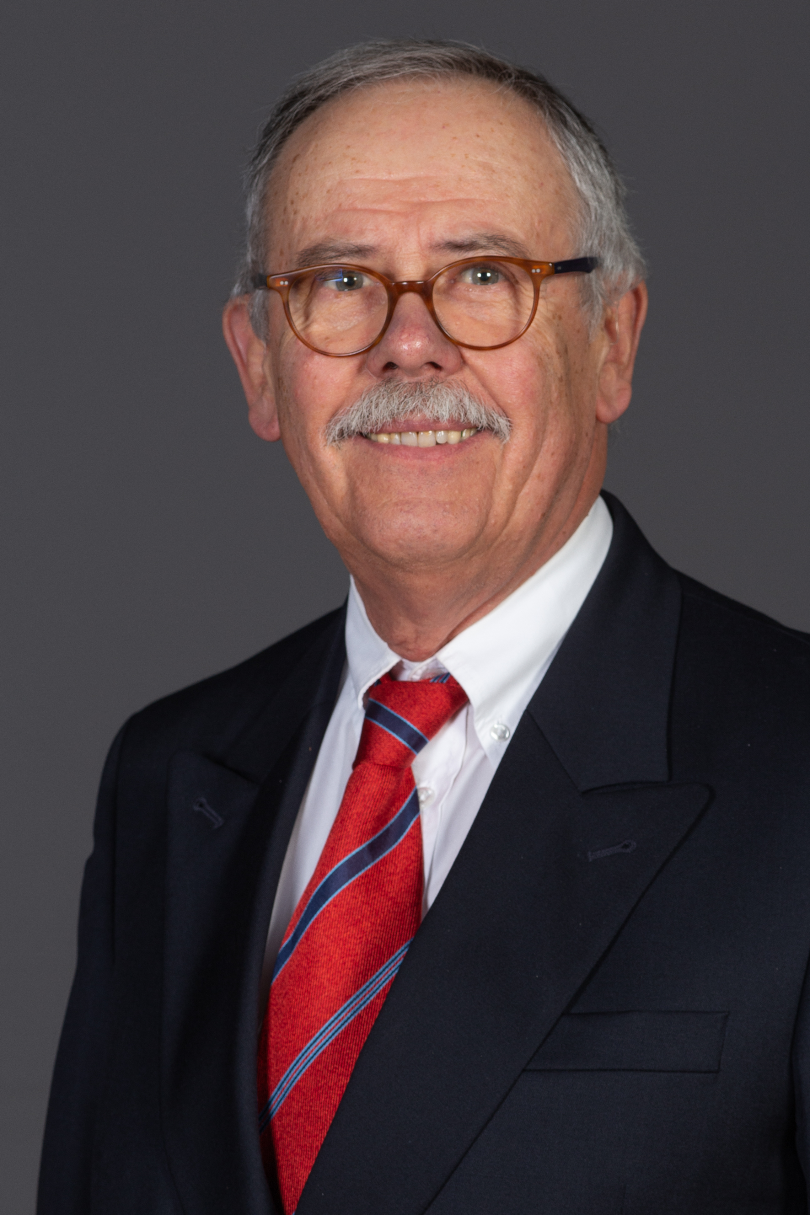 Abgeordnete(r) der Bürgerschaft der Freien und Hansestadt Hamburg Gerhard Lein